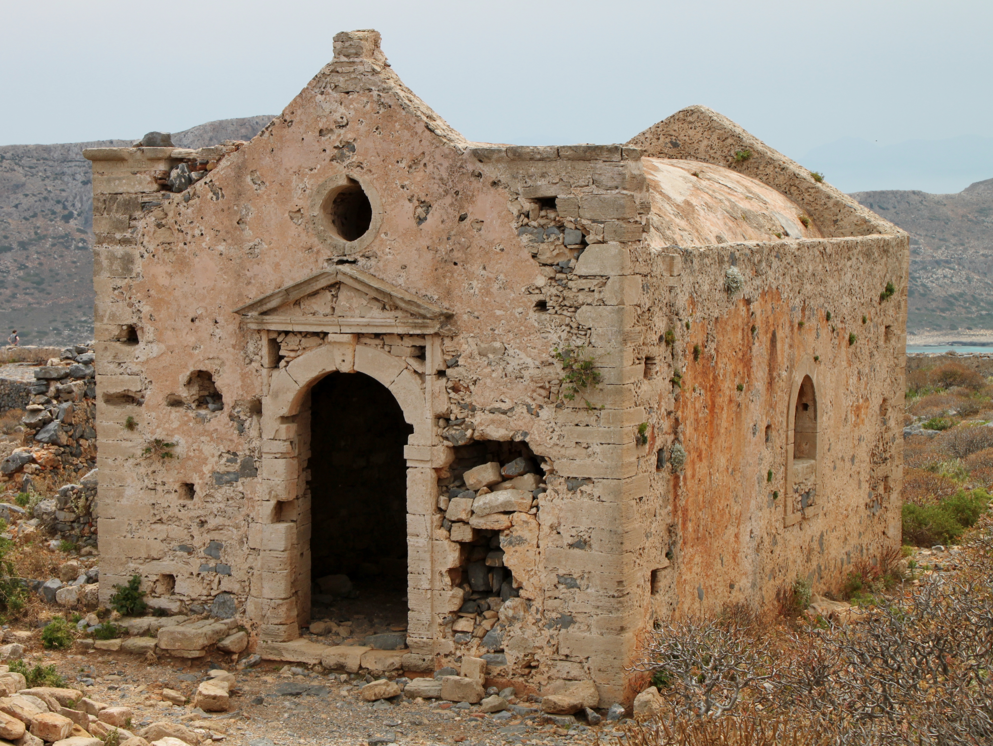 Ehemalige Kirche in der Festungsruine Kastro Gramvousas (Κάστρο Γραμβούσας) auf Imeri Gramvousa (Ήμερη Γραμβούσα), Insel in der Gemeinde Kissamos, Präfektur Chania, Kreta, Griechenland